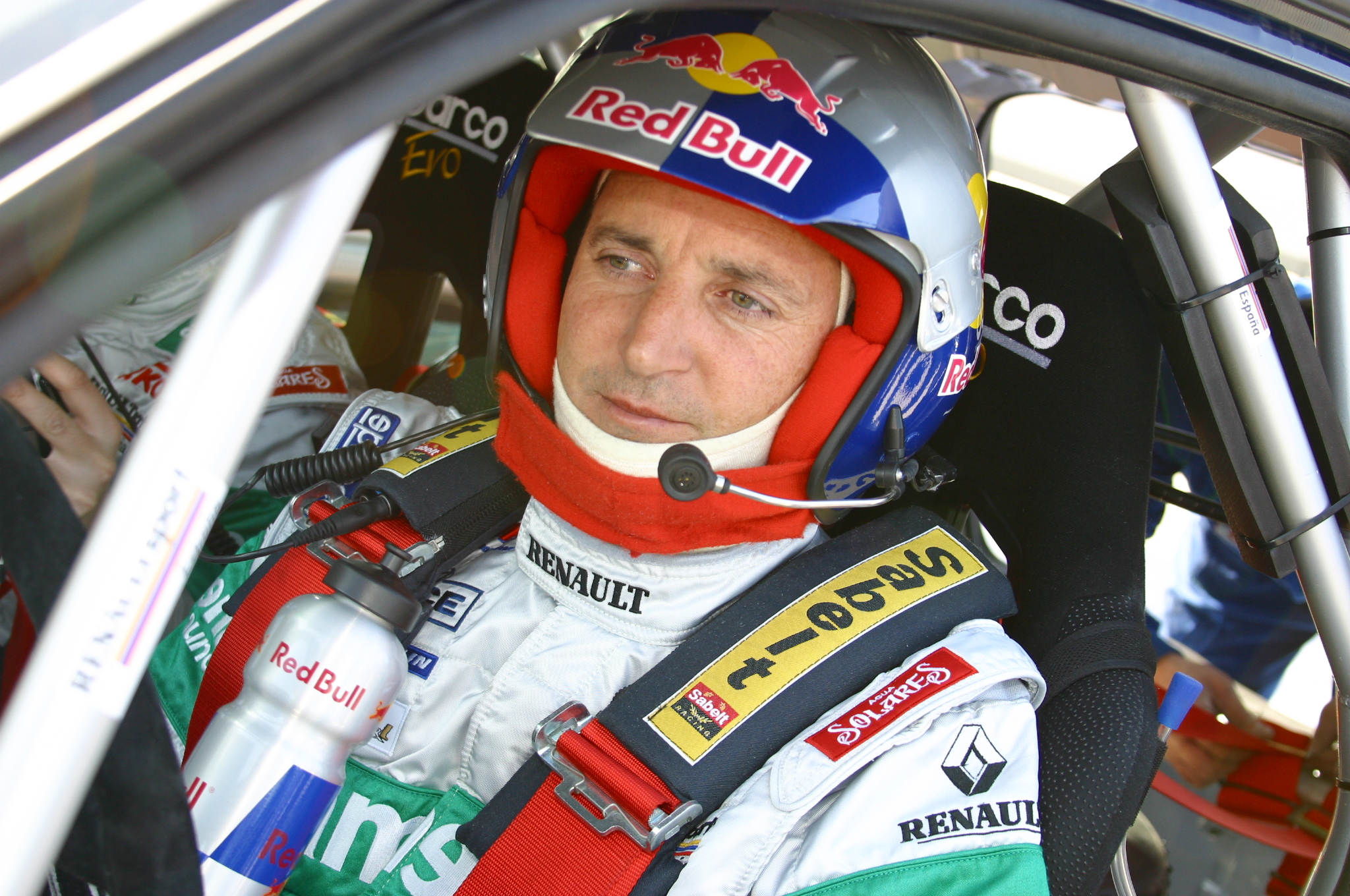 Jesús Puras como piloto de Renault